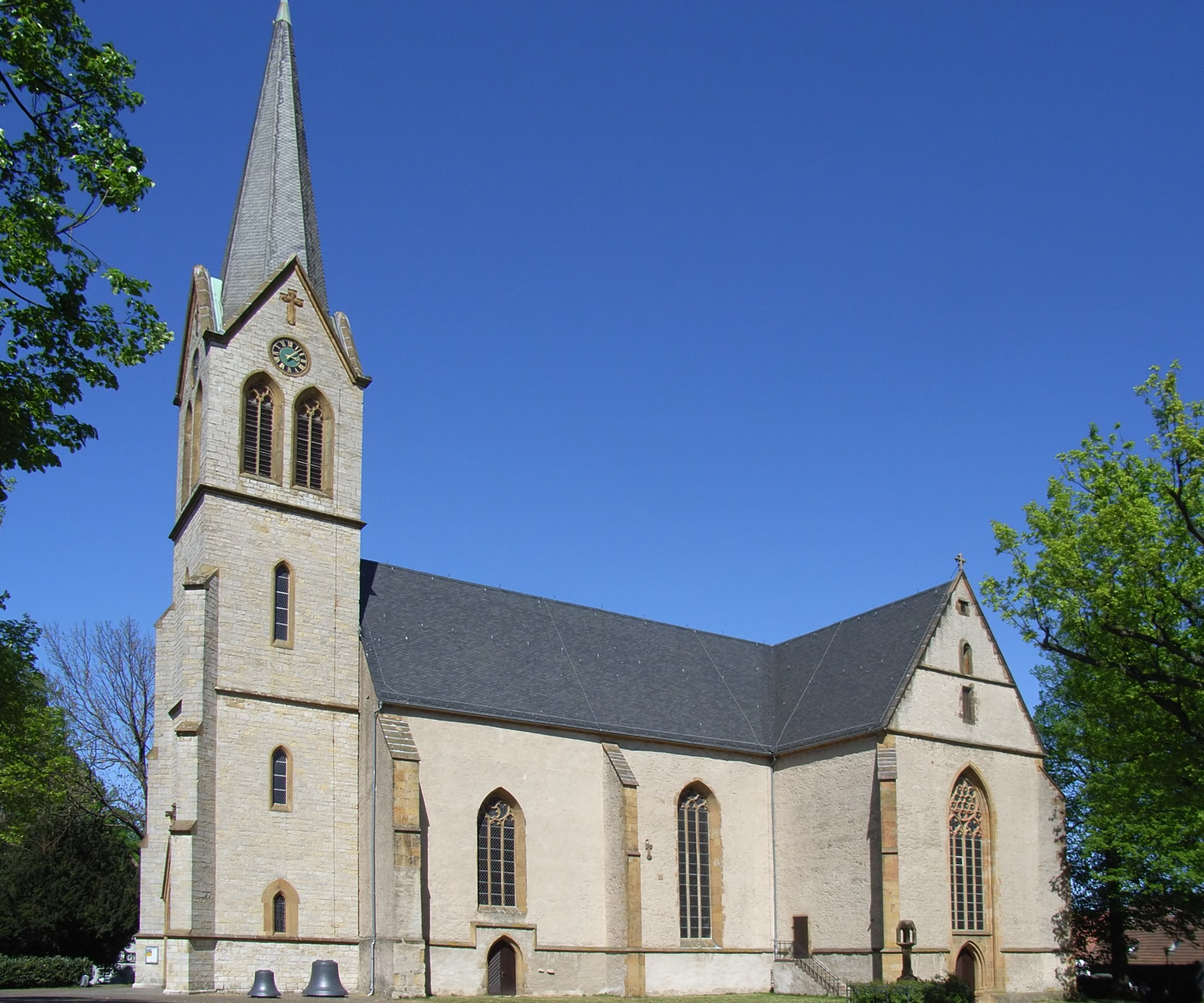 Bielefeld, Deutschland: Stiftskirche Schildesche.